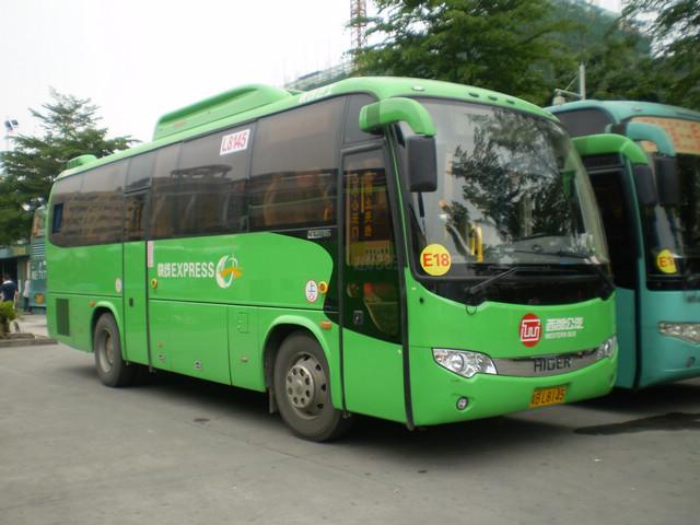 深圳公交E18路KLQ6920E